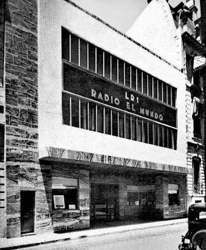 Edificio de Maipú 555 en tiempos de Radio El Mundo